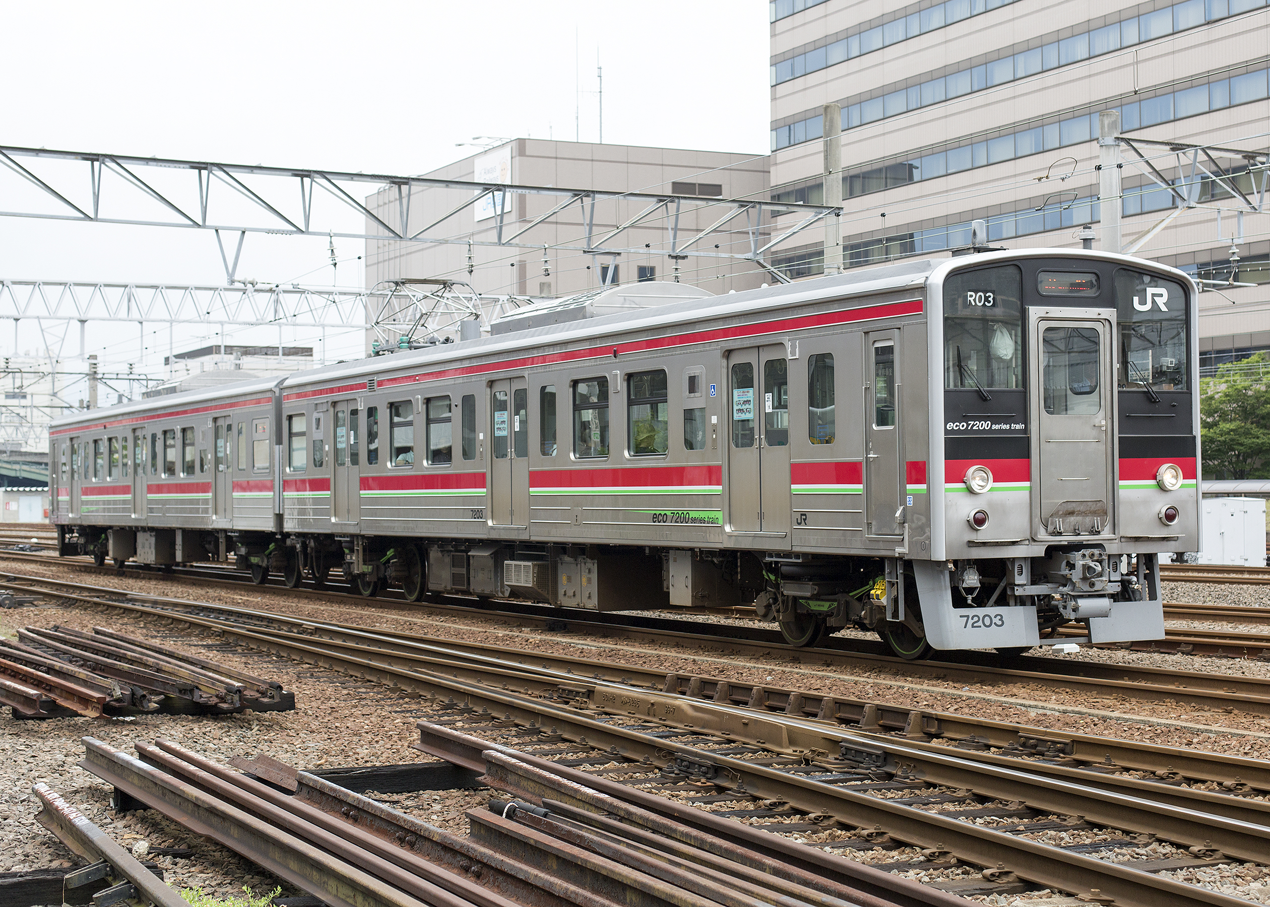 JR四国 7200系 7203+7303 高松駅付近にて